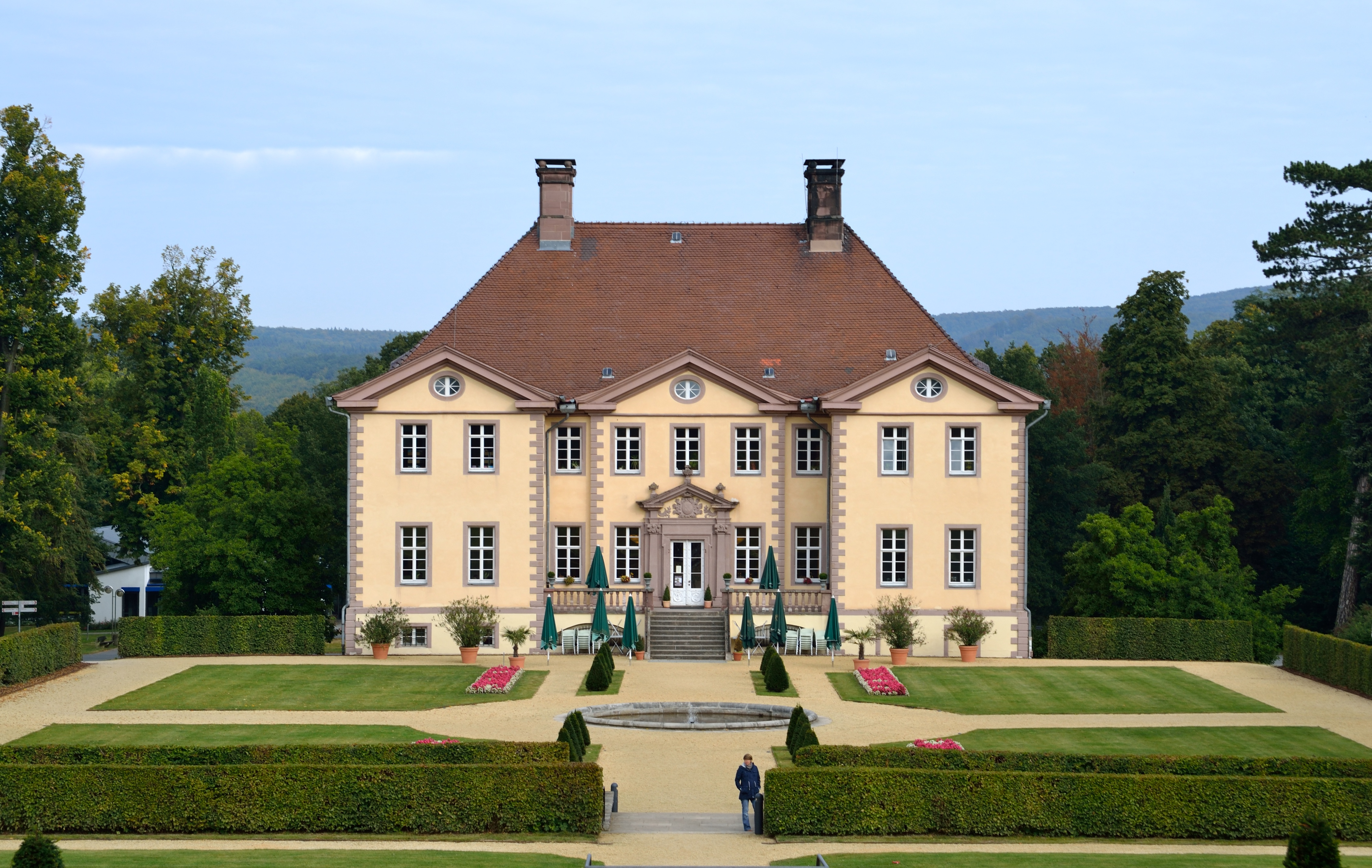 This is a photograph of an architectural monument. Schloss Schieder